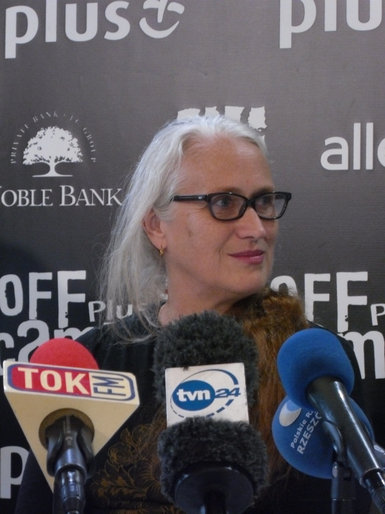 Zdjęcie zrobione podczas międzynarodowego festiwalu kina niezależnego Off Plus Camera 2010 w Krakowie.